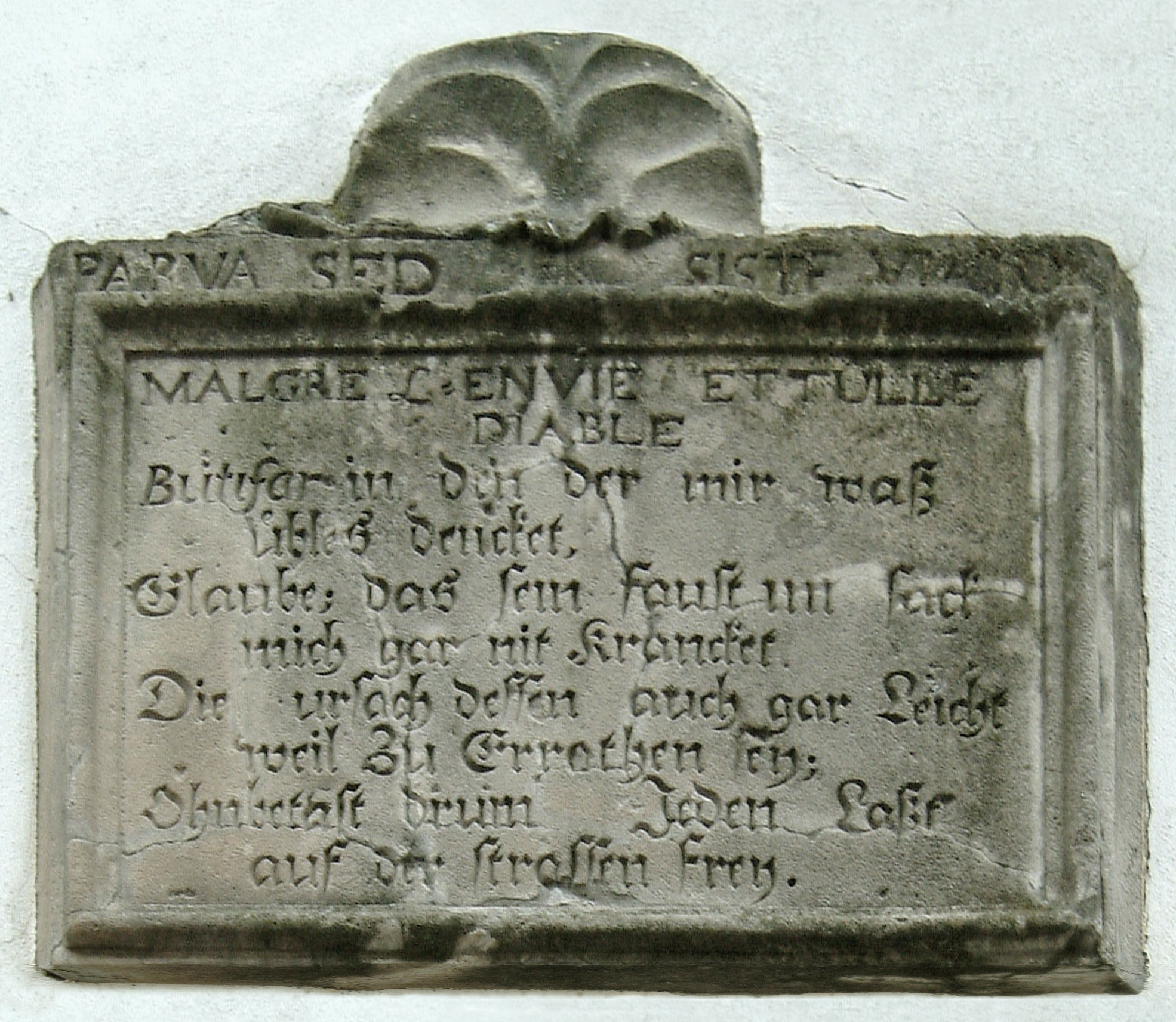 Kartusche mit Inschrift über dem Neidkopf am Michelstor zu Dirmstein